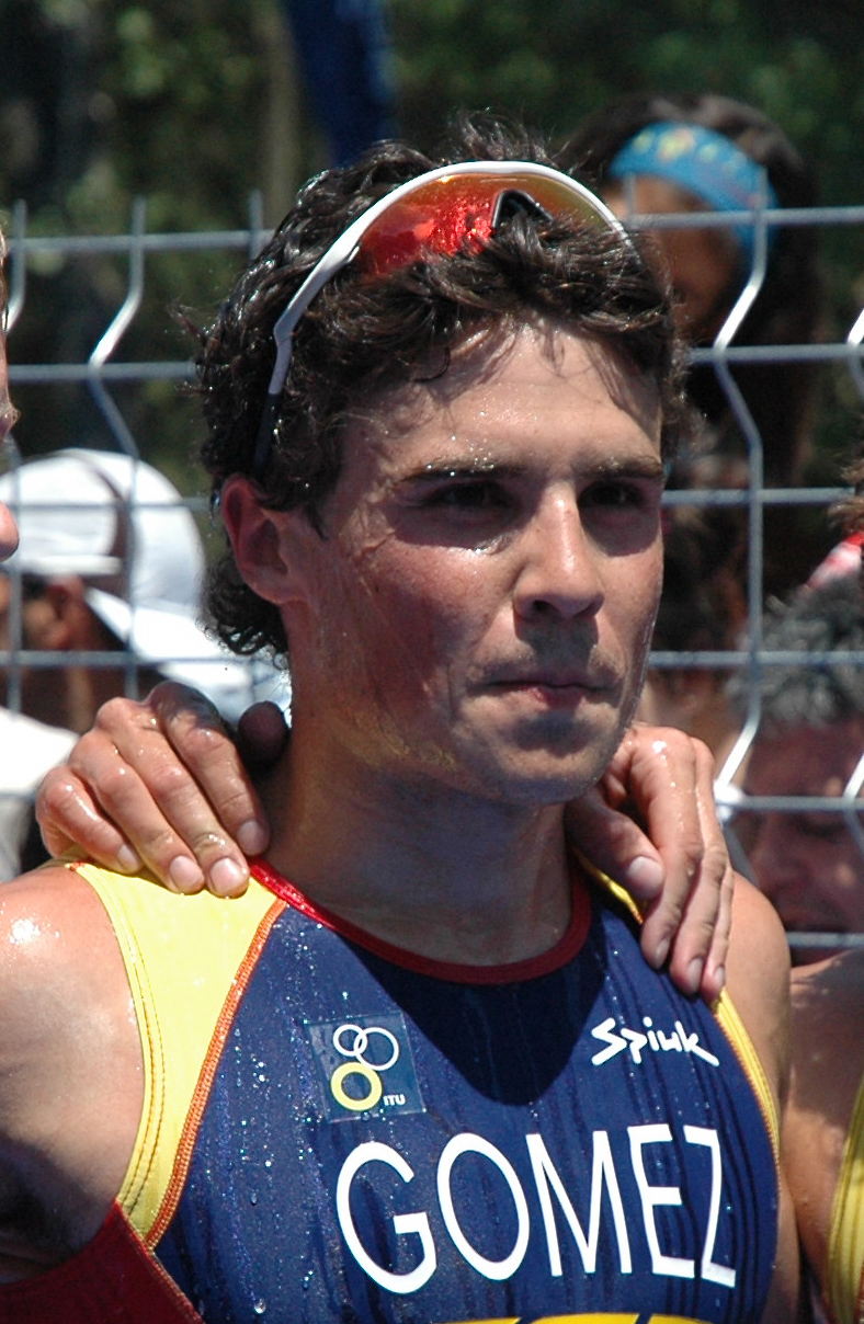 O triatleta Xavier Gómez Noya, logo de gañar a Copa do Mundo de Madrid, en 2006.